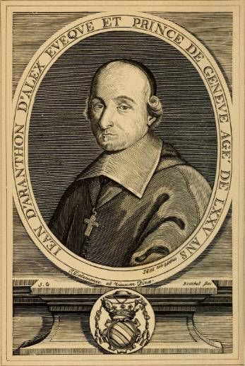 Portrait de Jean d'Arenthon d'Alex